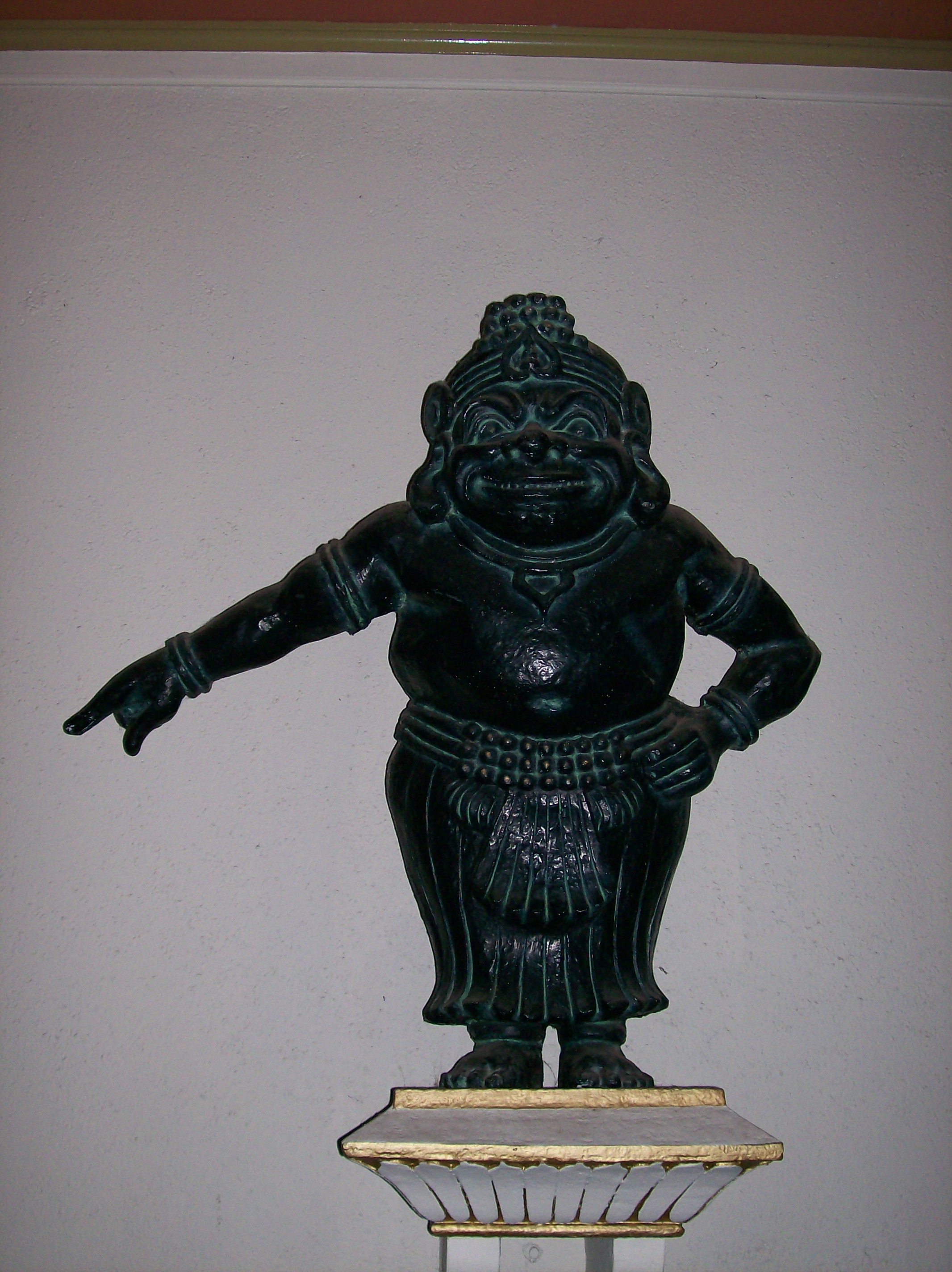 Statue dans les Nénuphars indiens